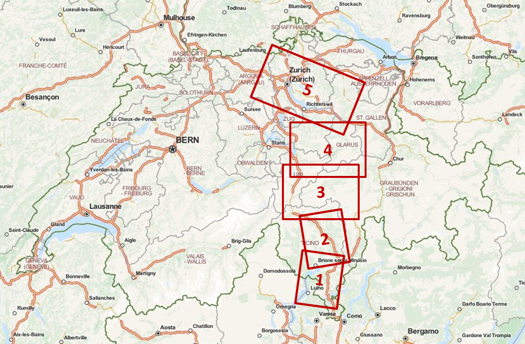 Gebiet der heutigen Schweiz, das durch die fünf Hauptkarten des Atlas Suworow abgedeckt wird.